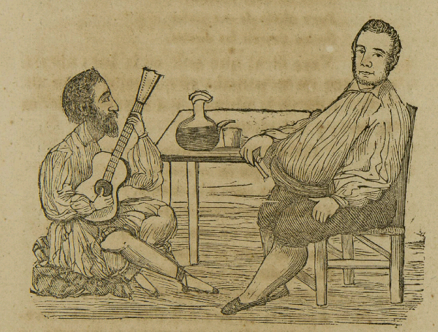 Dibuix que representa a Bernat i Baldoví, dins les pàgines del diari "La Donsayna"